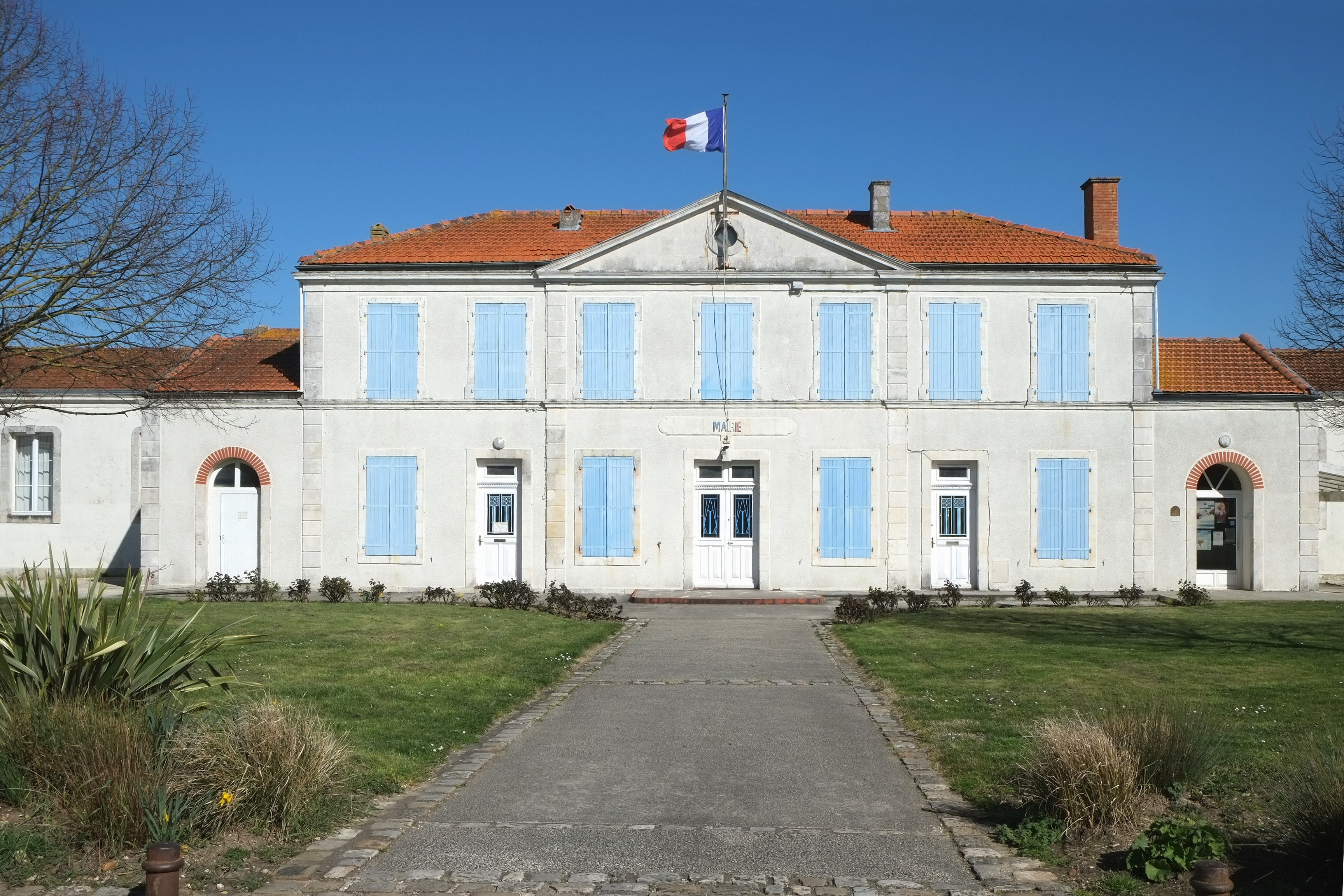 Mairie Breuil-Magné Charente-Maritime France